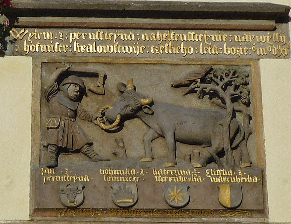 Schloss Pardubitz (Pardubice) in Böhmen, Relief am Schlosstor